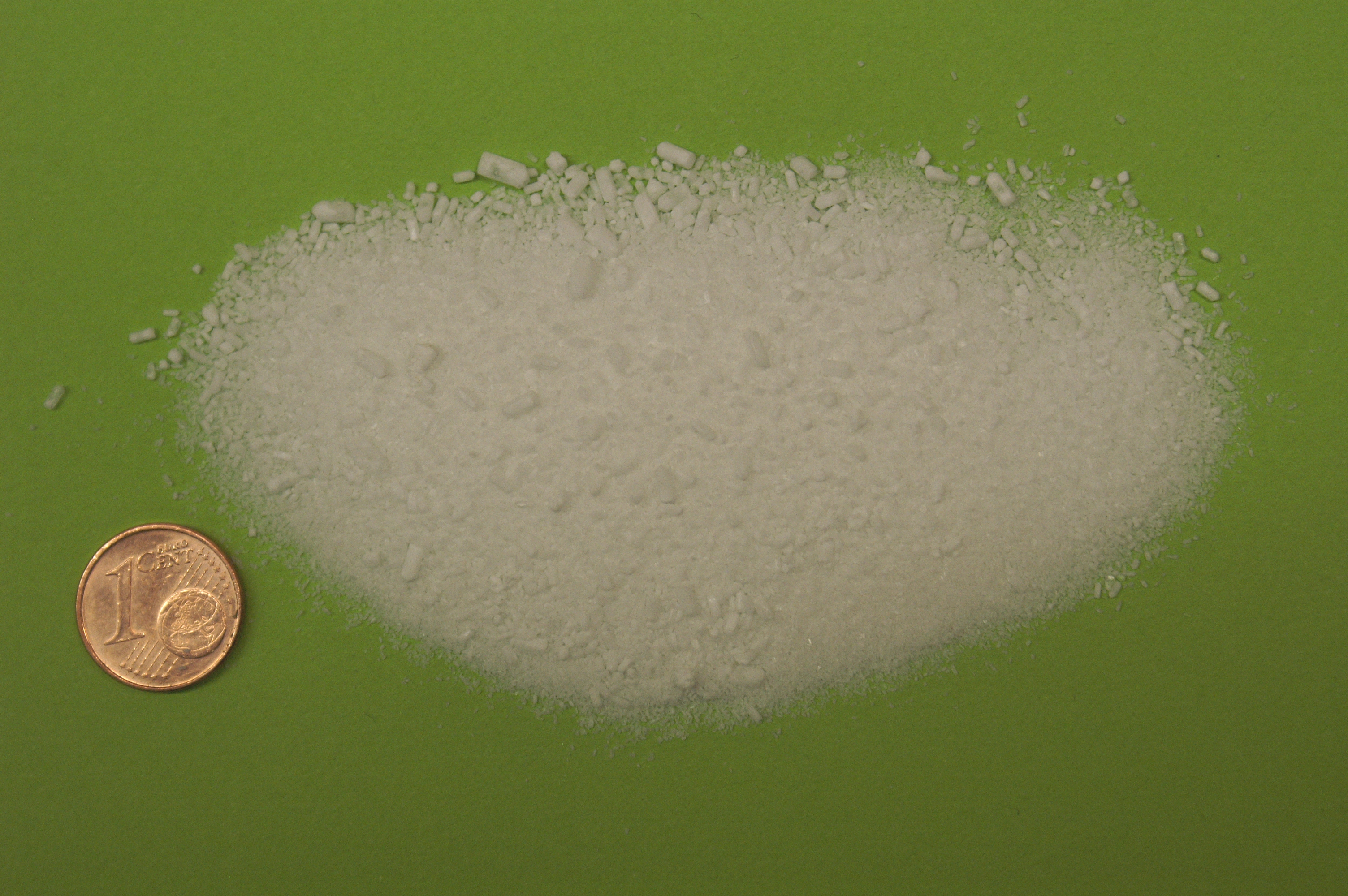 Bittersalz mit 49 % Magnesiumsulfat